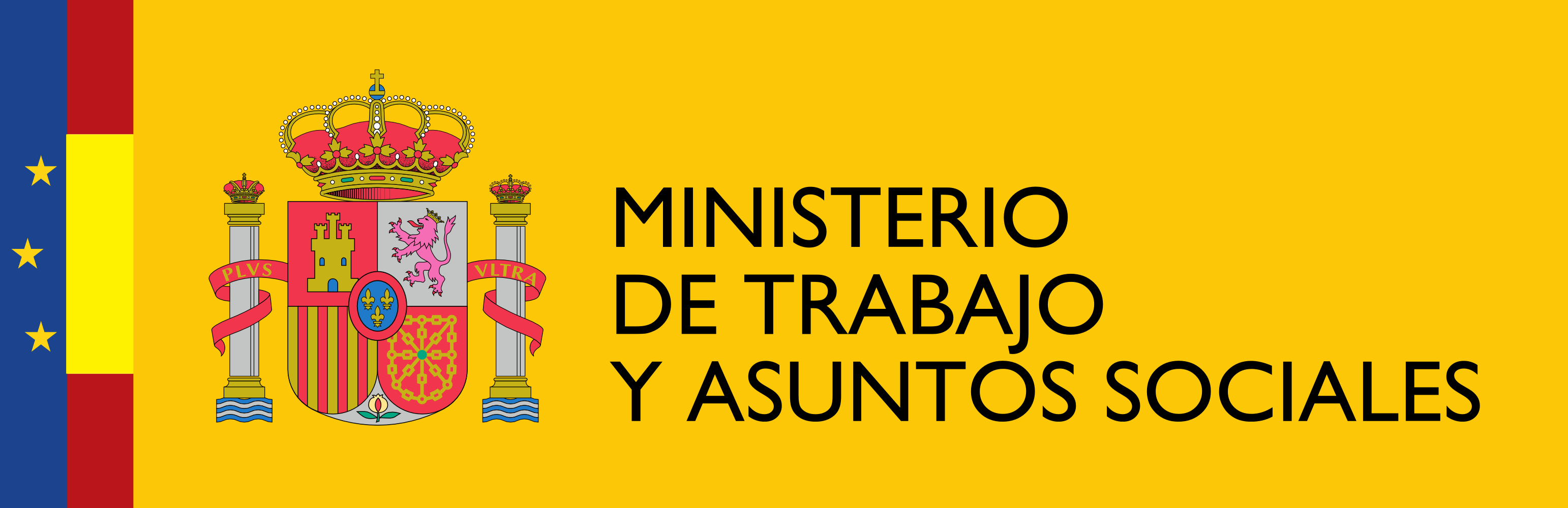 Logotipo del Ministerio de Trabajo y Asuntos Sociales